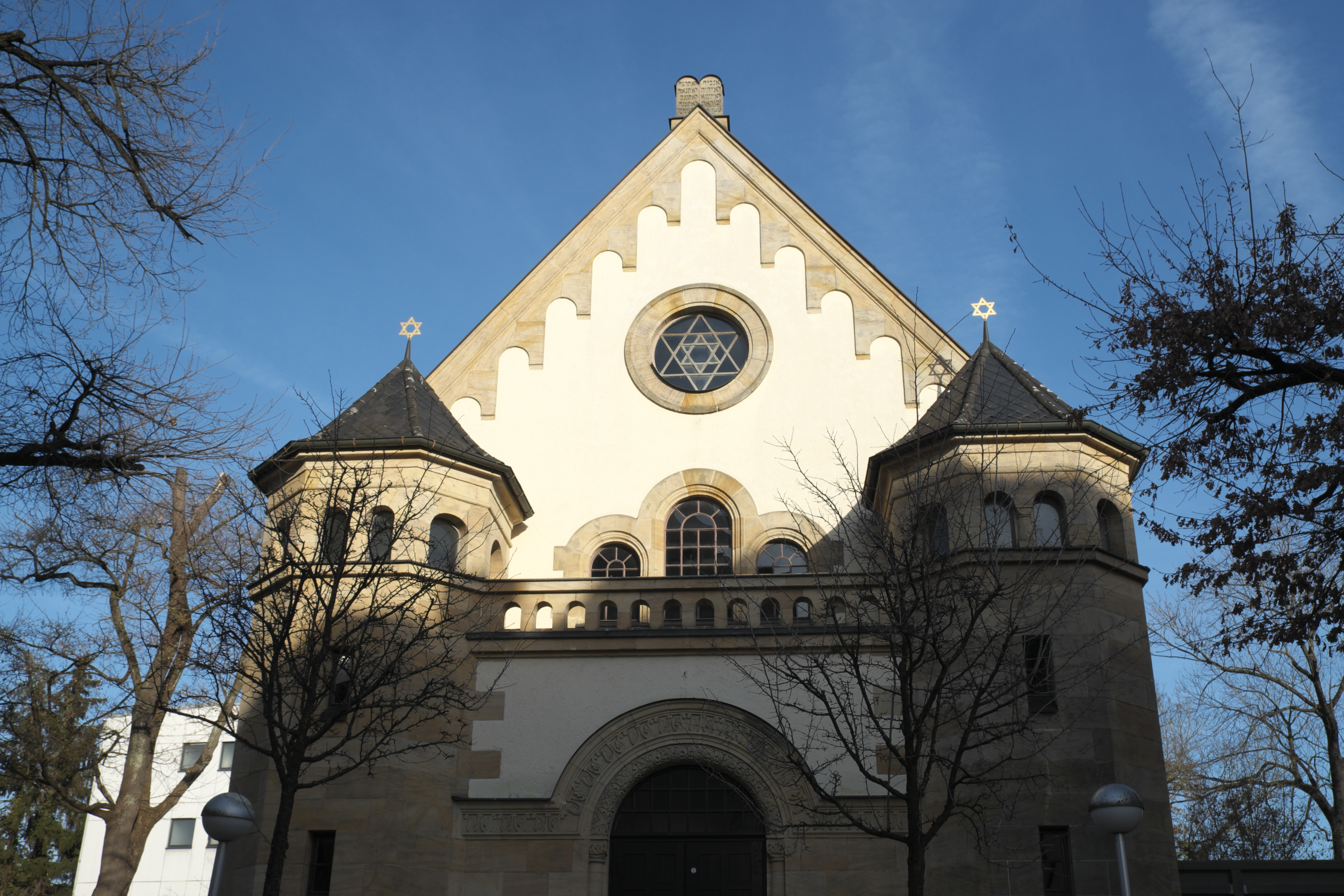 Synagoge in Straubing (Bayern/Deutschland)